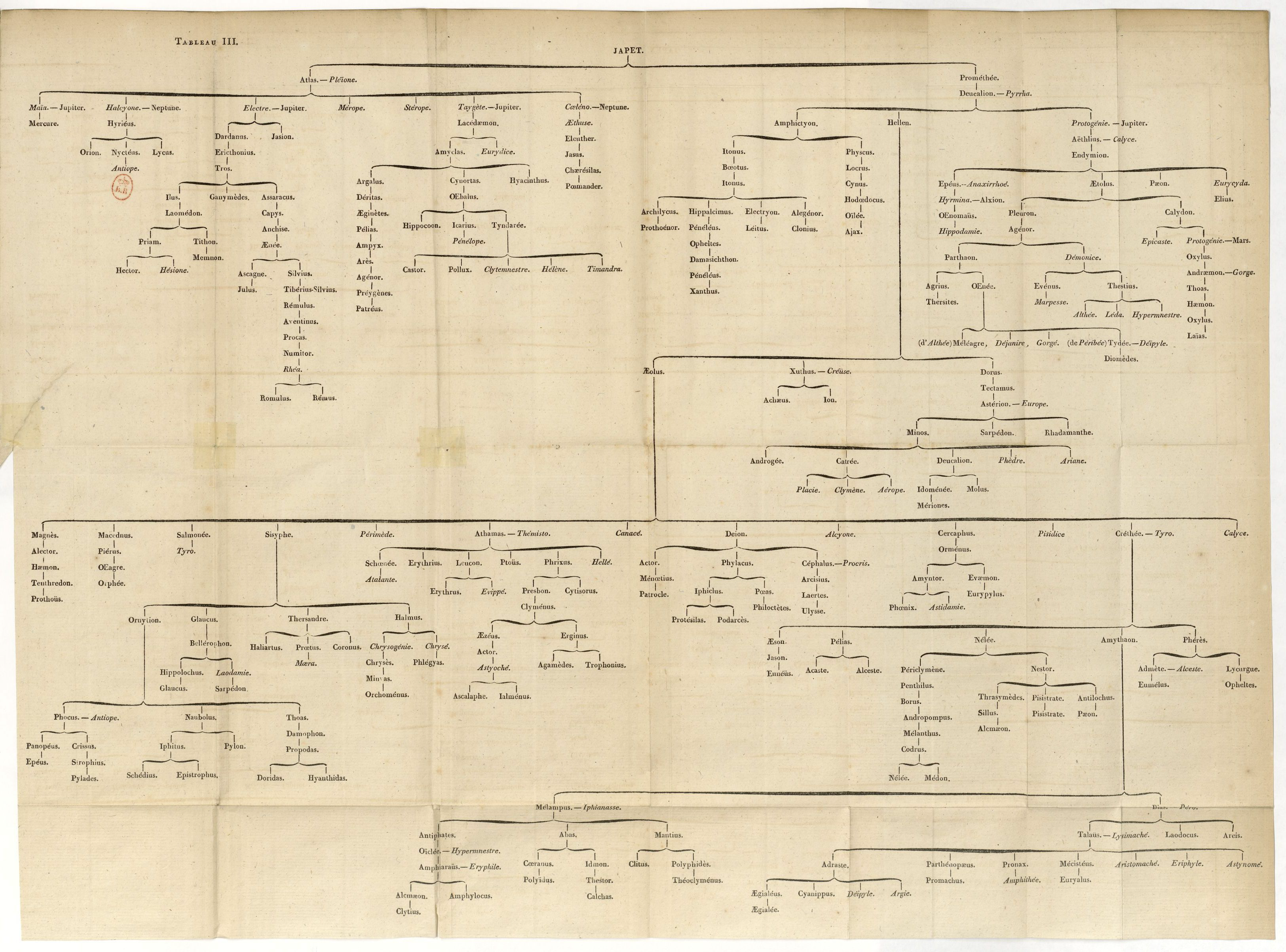 Tableau généalogique n°3